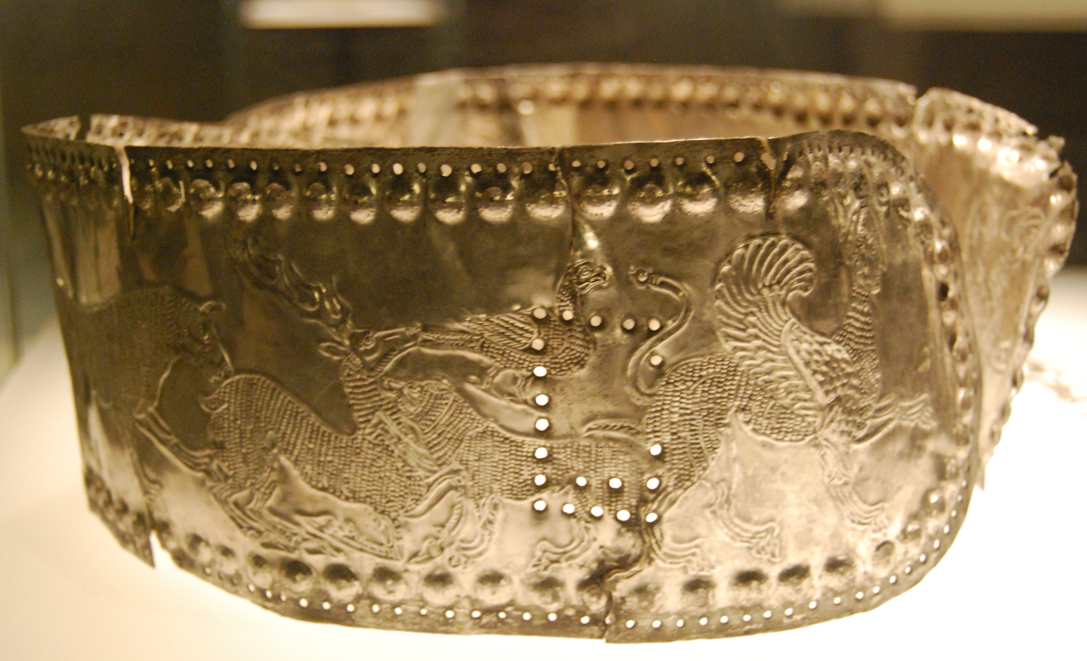 Georgia